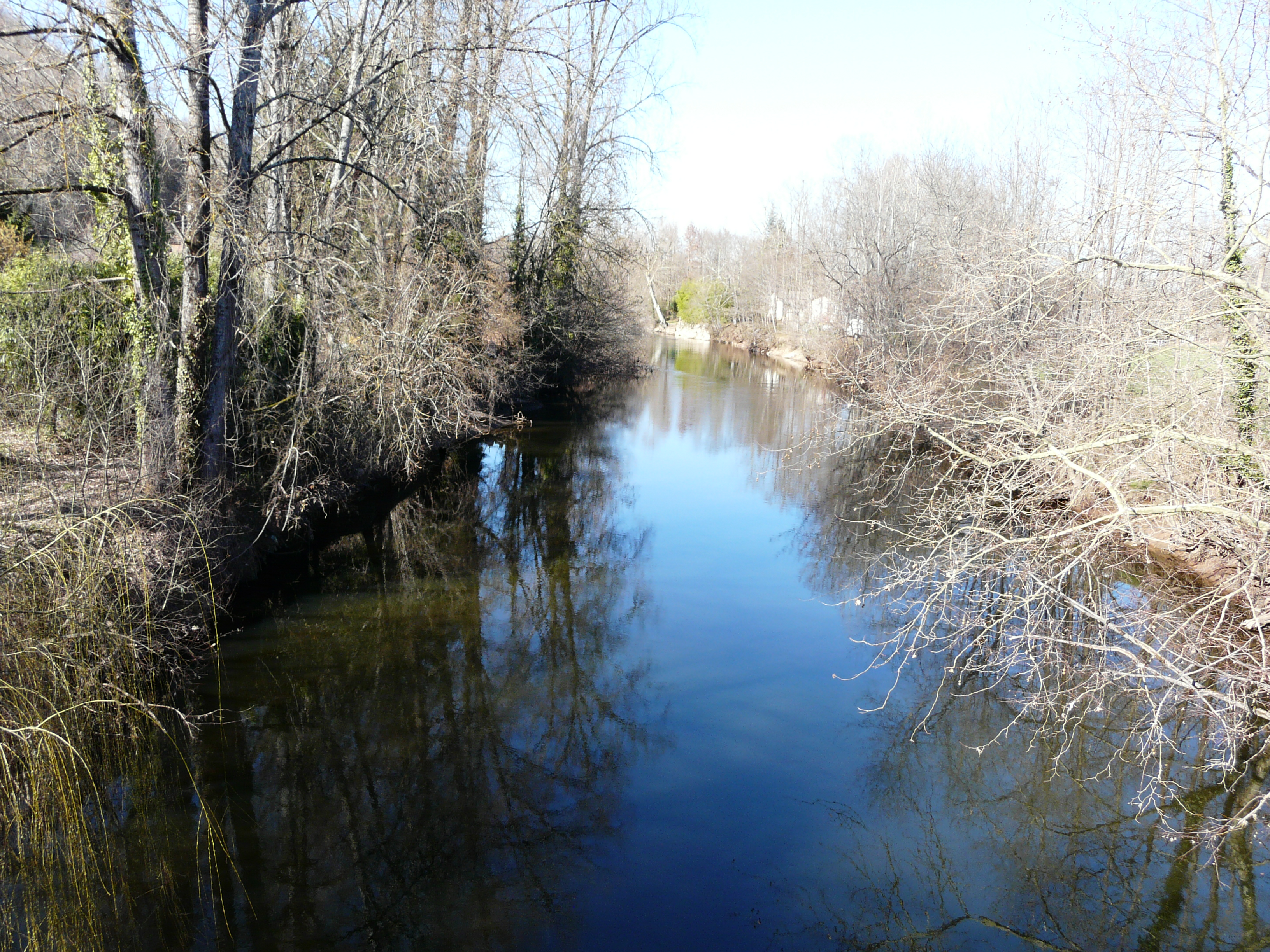 En amont du pont de la route départementale 69, la Vézère marque la limite entre Varetz (à gauche) et Ussac (à droite), Corrèze, France.